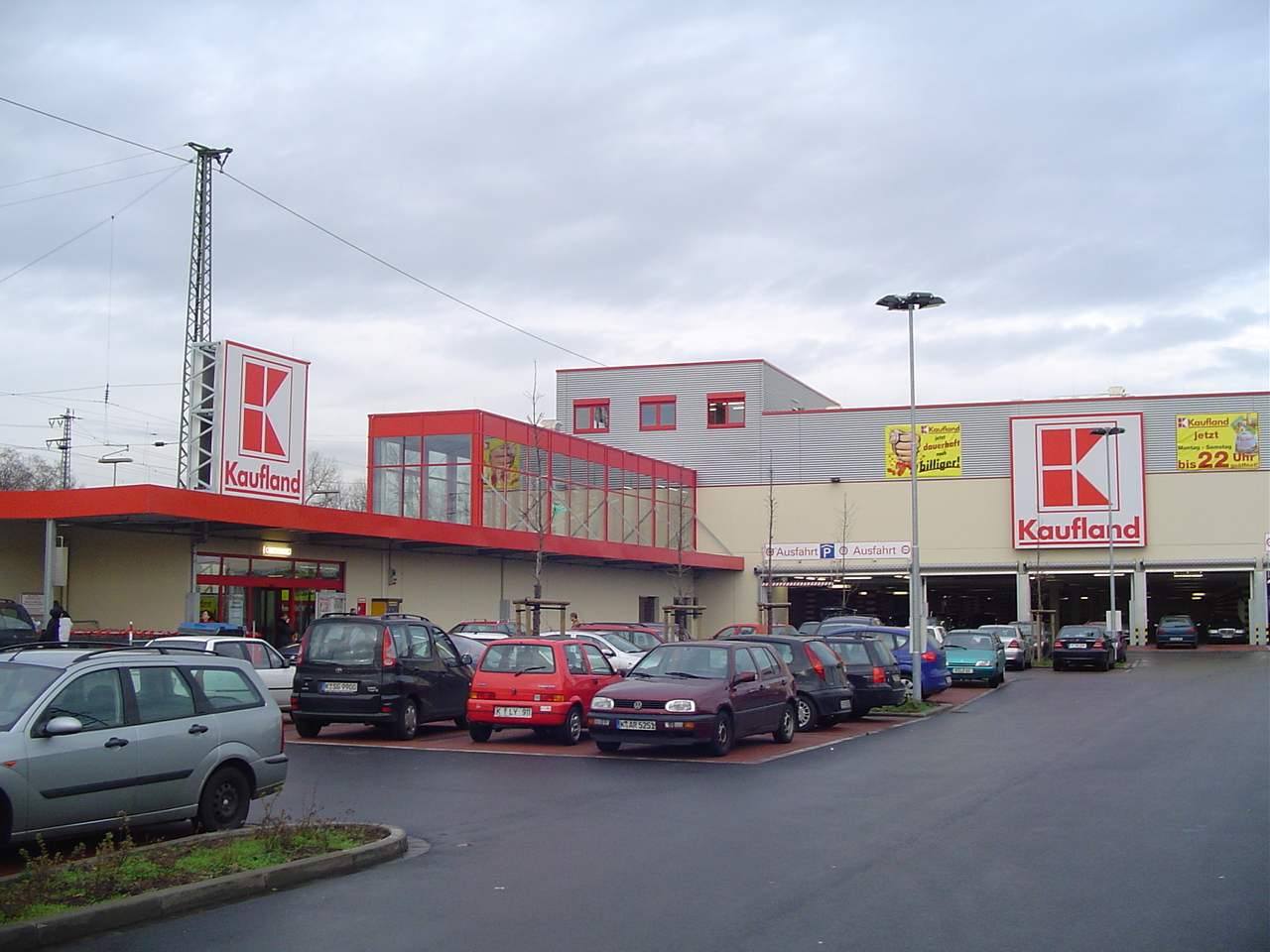 Kaufland-Filiale in Köln-Mülheim